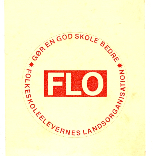 Det første klistermærke Folkeskoleelevernes Landsorganisation udsendte i 1979 indeholdt sloganet "Gør en god skole bedre".